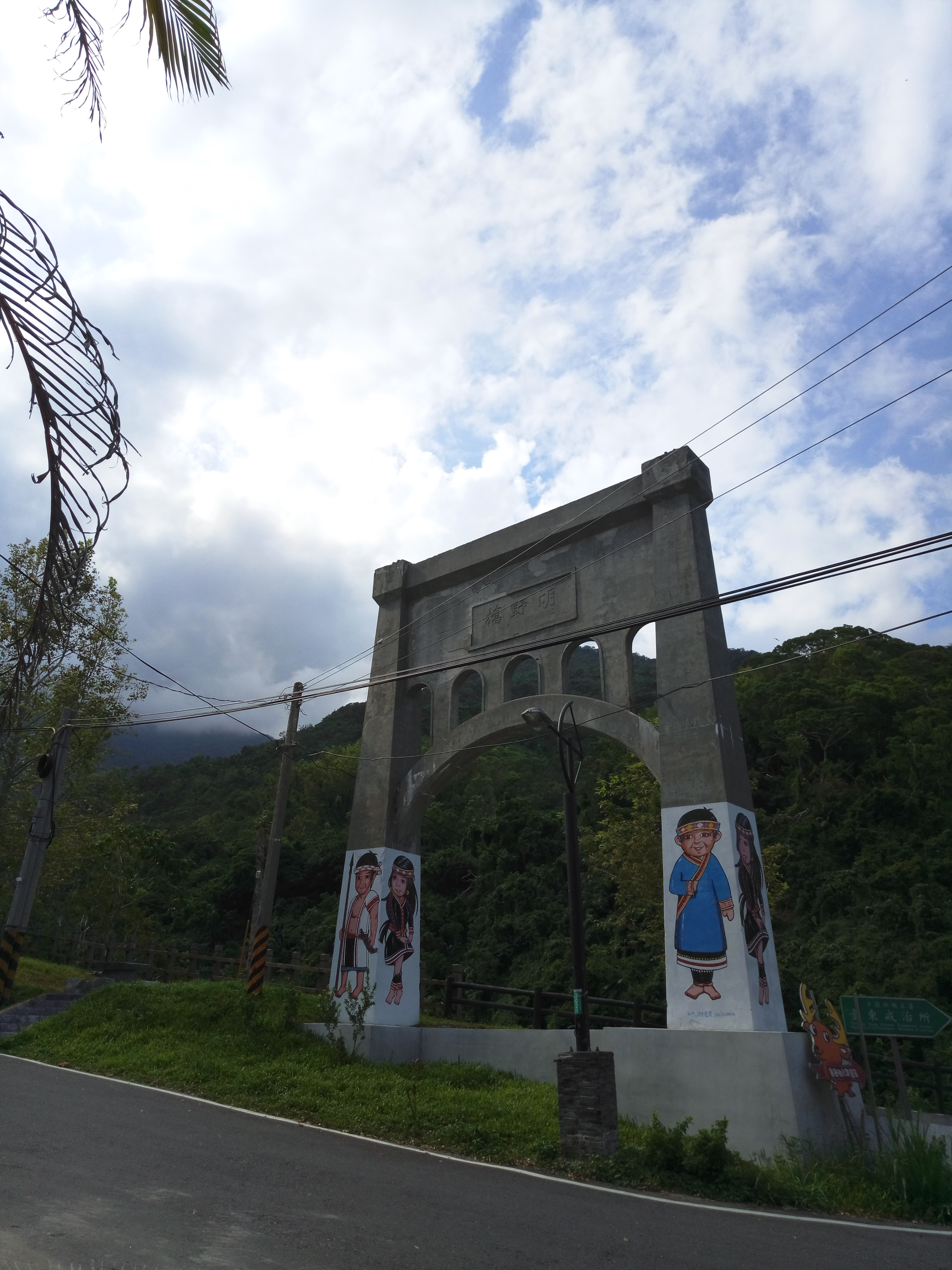 中文（台灣）: 明野橋 南岸墩座